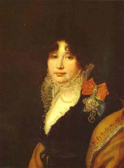 Щербатова Анастасия Валентиновна (княгиня, 1808)